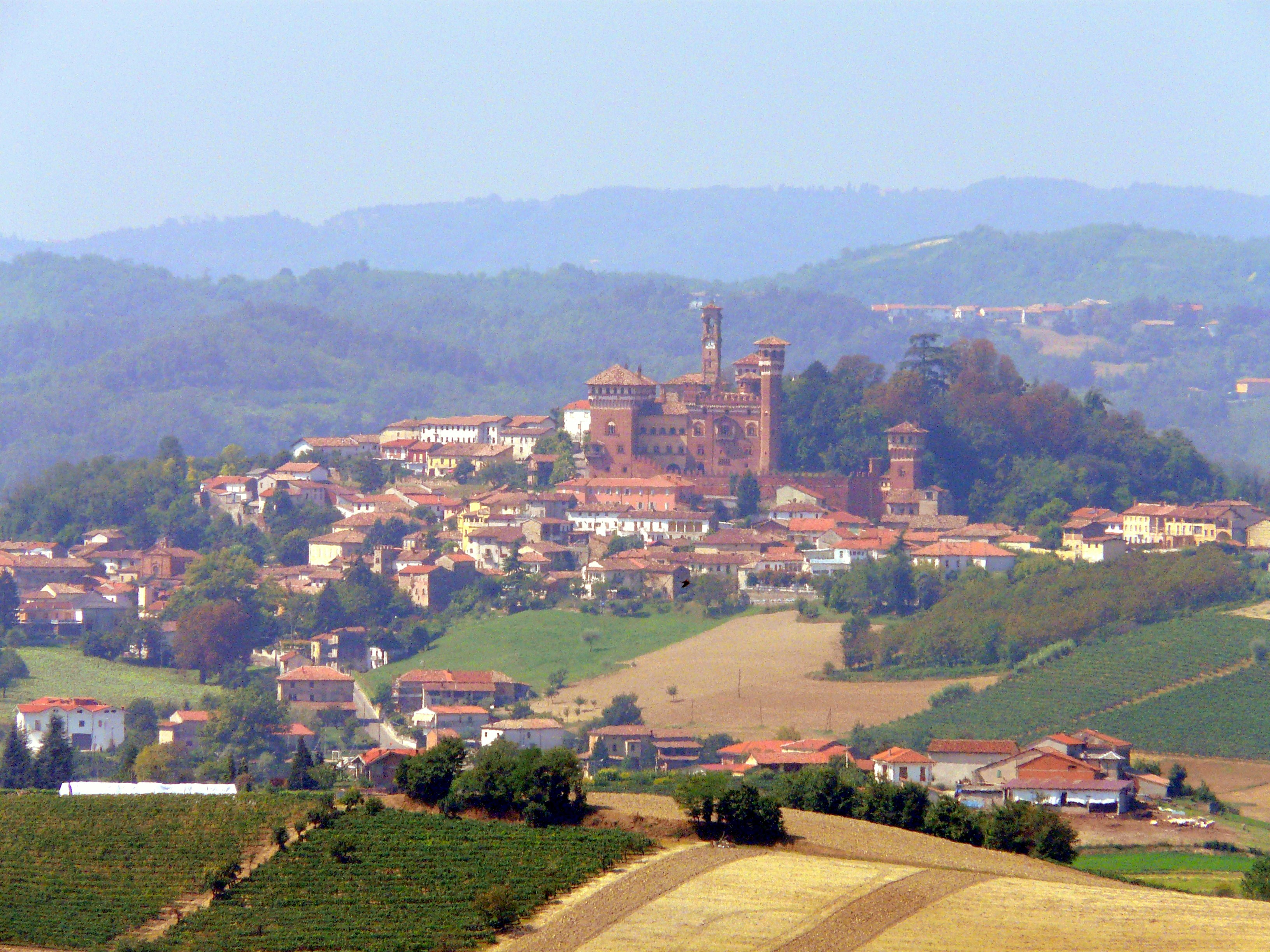 Panorama da Treville di Cereseto Monferrato, Piemonte, Italia